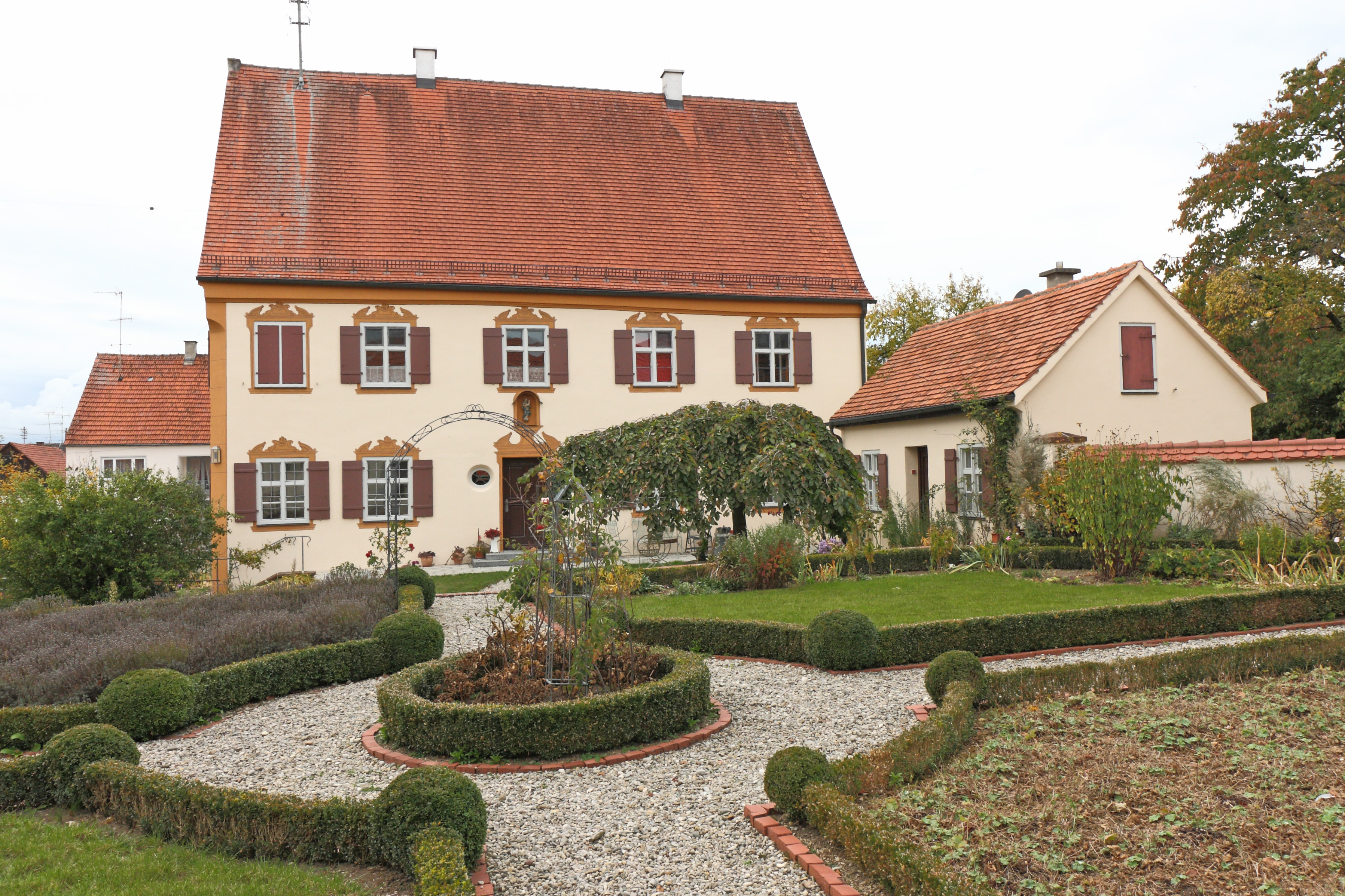 Pfarrhaus mit Garten von Osten gesehen